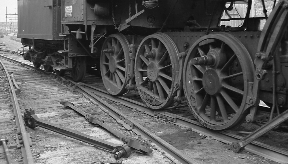 Driv- og koppelhjul på damplok nr. 412. Veiv- og koppelstenger er demontert. Hamar st.